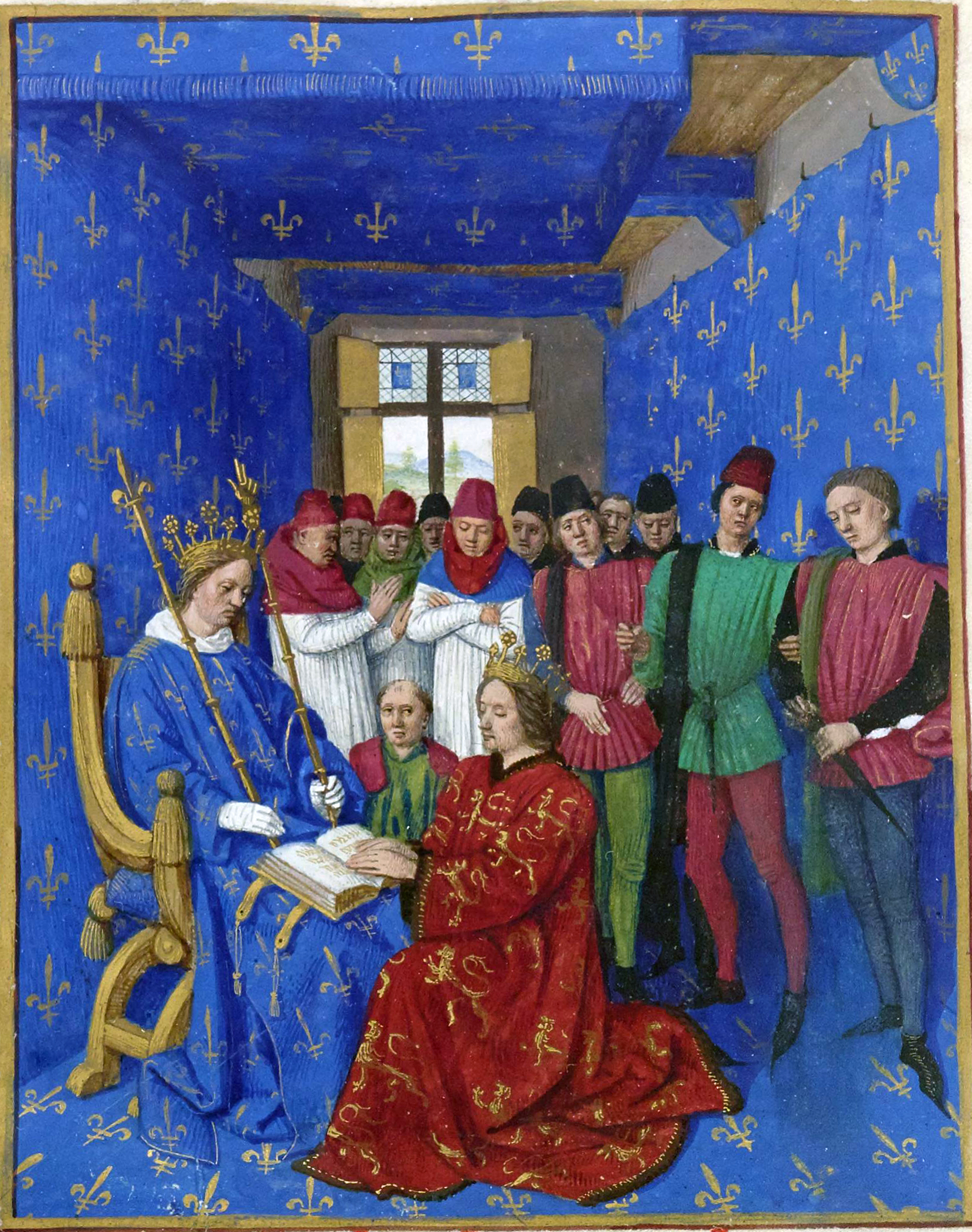 Hommage d'Édouard Ier à Philippe le Bel Grandes Chroniques de France, enluminées par Jean Fouquet, Tours, vers 1455-1460 Paris, BnF, département des Manuscrits, Français 6465, fol. 301v. (Livre de Philippe le Bel) Hommage d'Édouard Ier à Philippe le Bel : Le 5 juin 1286, Édouard Ier, fils du roi d'Angleterre Henri III, rend hommage au roi de France Philippe le Bel. La scène a lieu dans une salle du palais royal en présence de la cour.